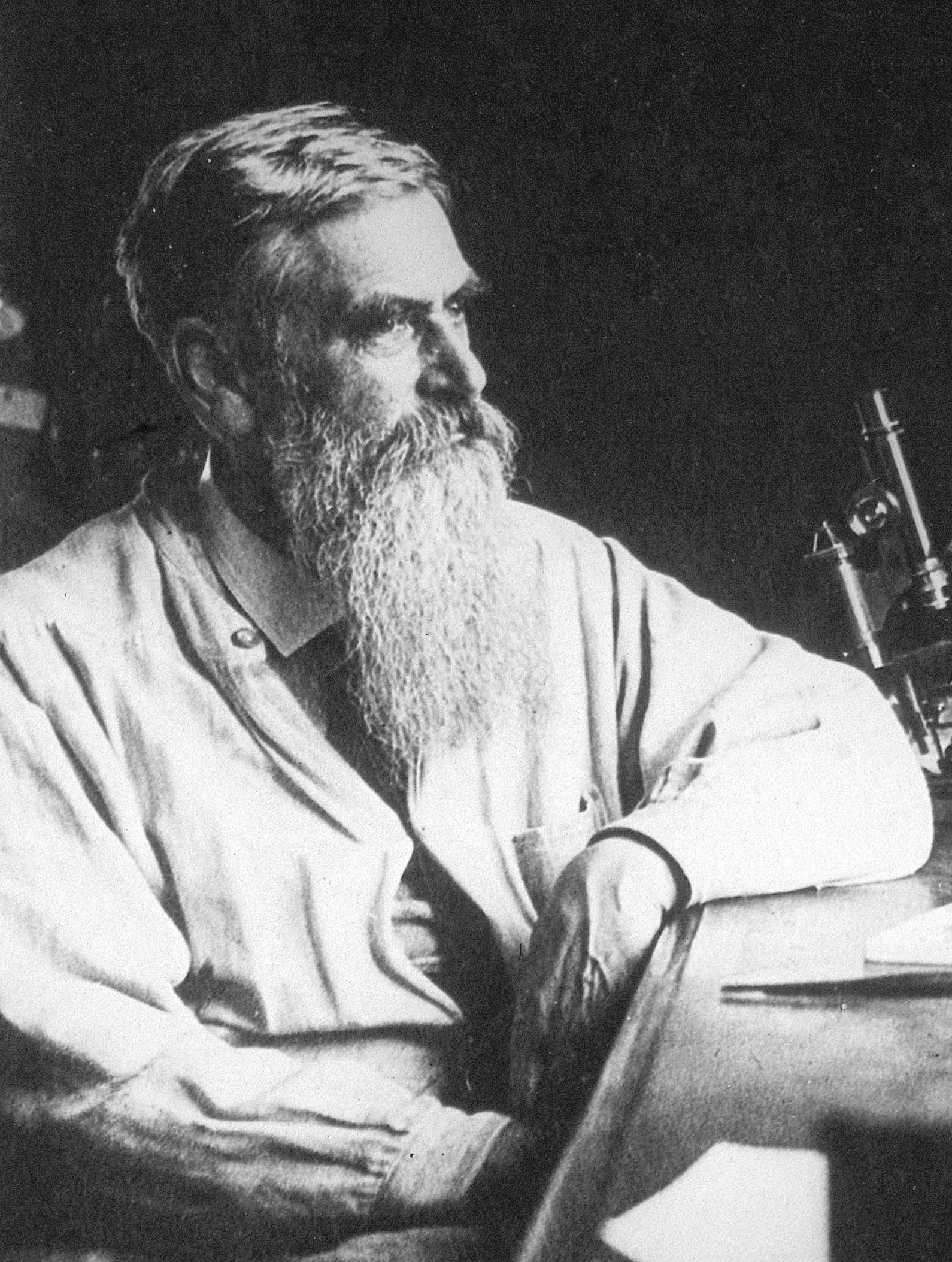 Otto Bütschli